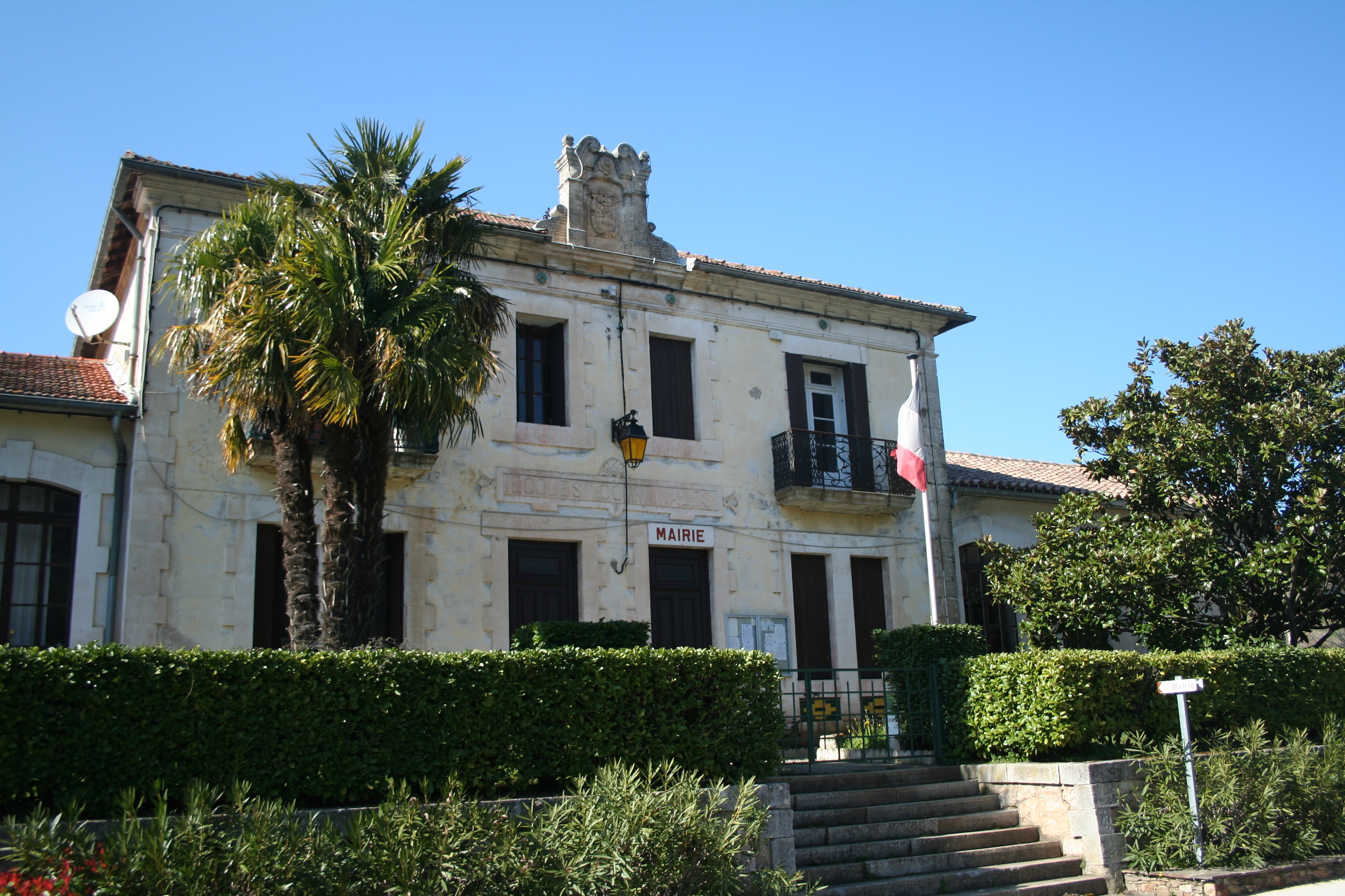 Saint-Étienne-d'Albagnan (Hérault) - mairie.